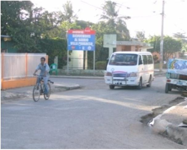 Transporte Publico